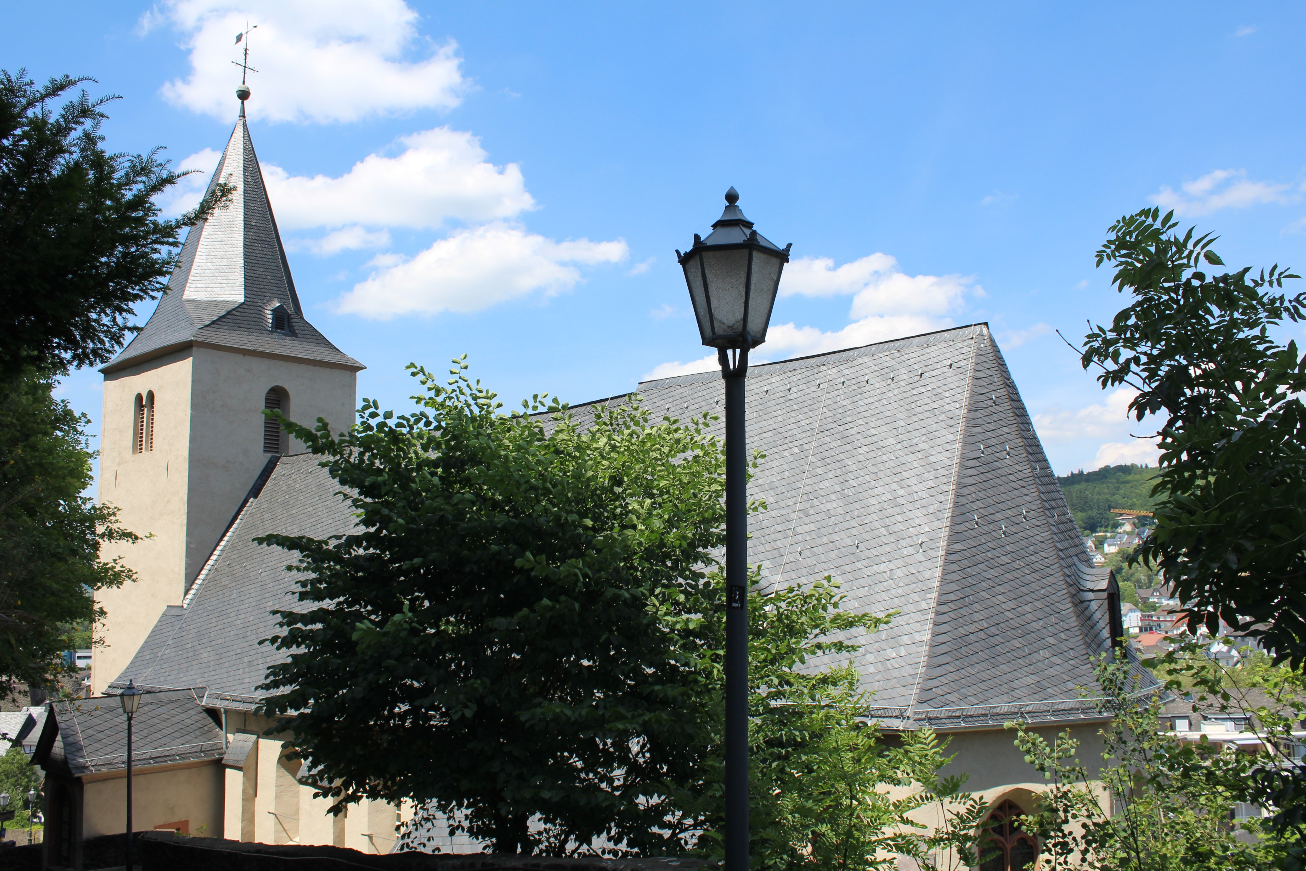 Evangelische Stadtkirche Dillenburg, Hessen, Deutschland